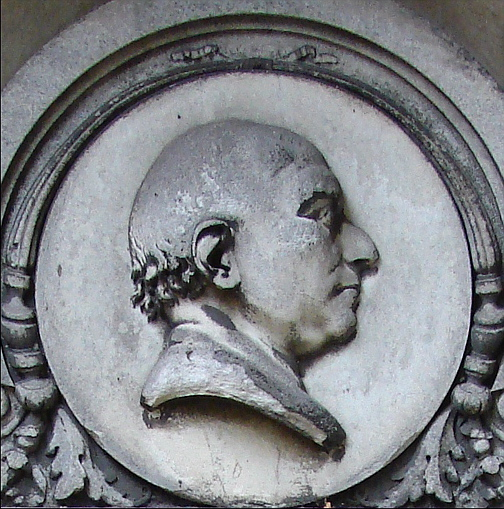 Balthasar Münter (1735-1793), præst, fra gravminde ved Sankt Petri Kirkes gravkapeller, København